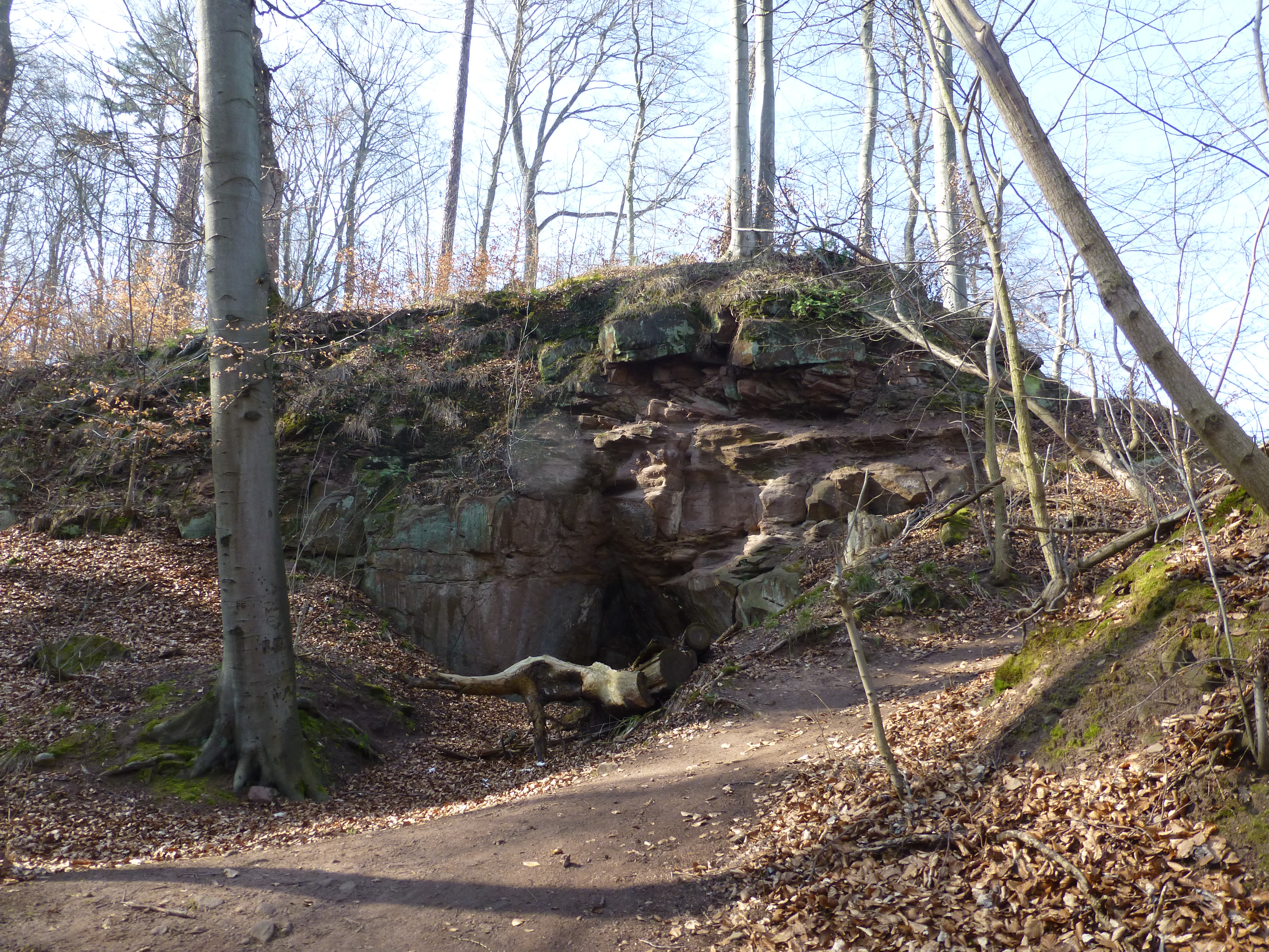 Wanderweg und Sandsteinfelsen auf der Alten Burg